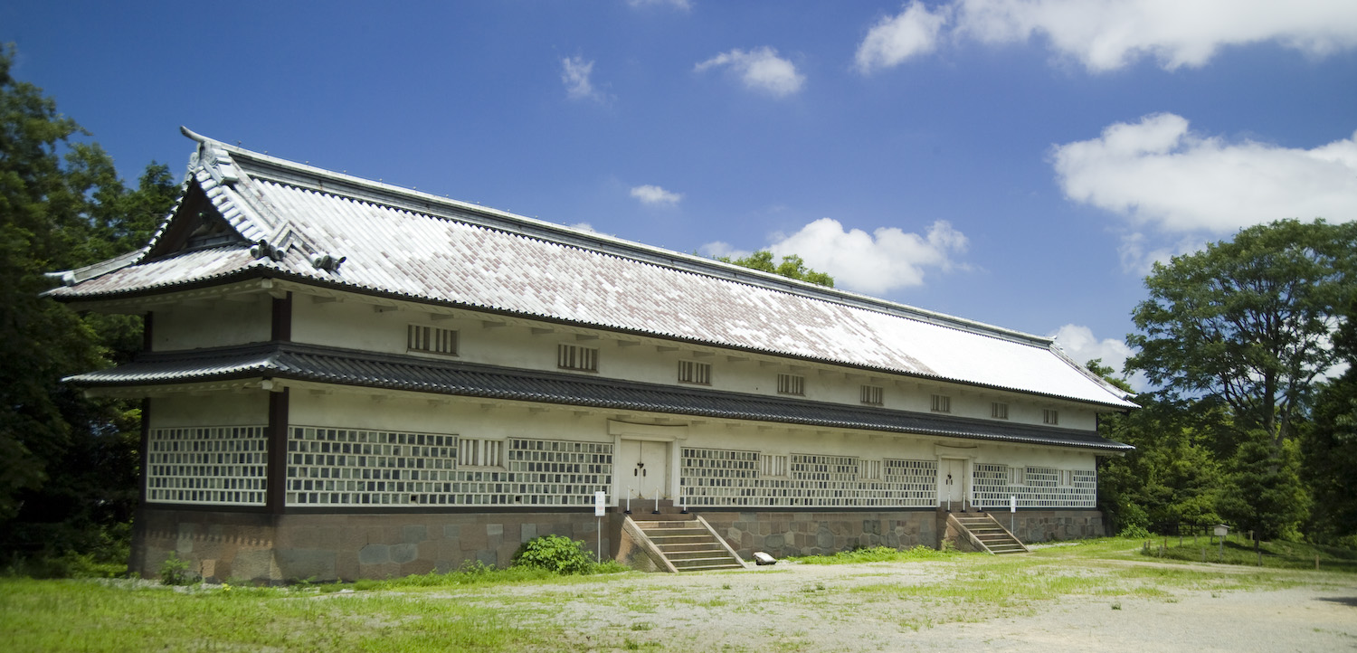 Kanazawa Castle, Kanazawa, Ishikawa Prefecture, Japan Sanjikken Nagaya